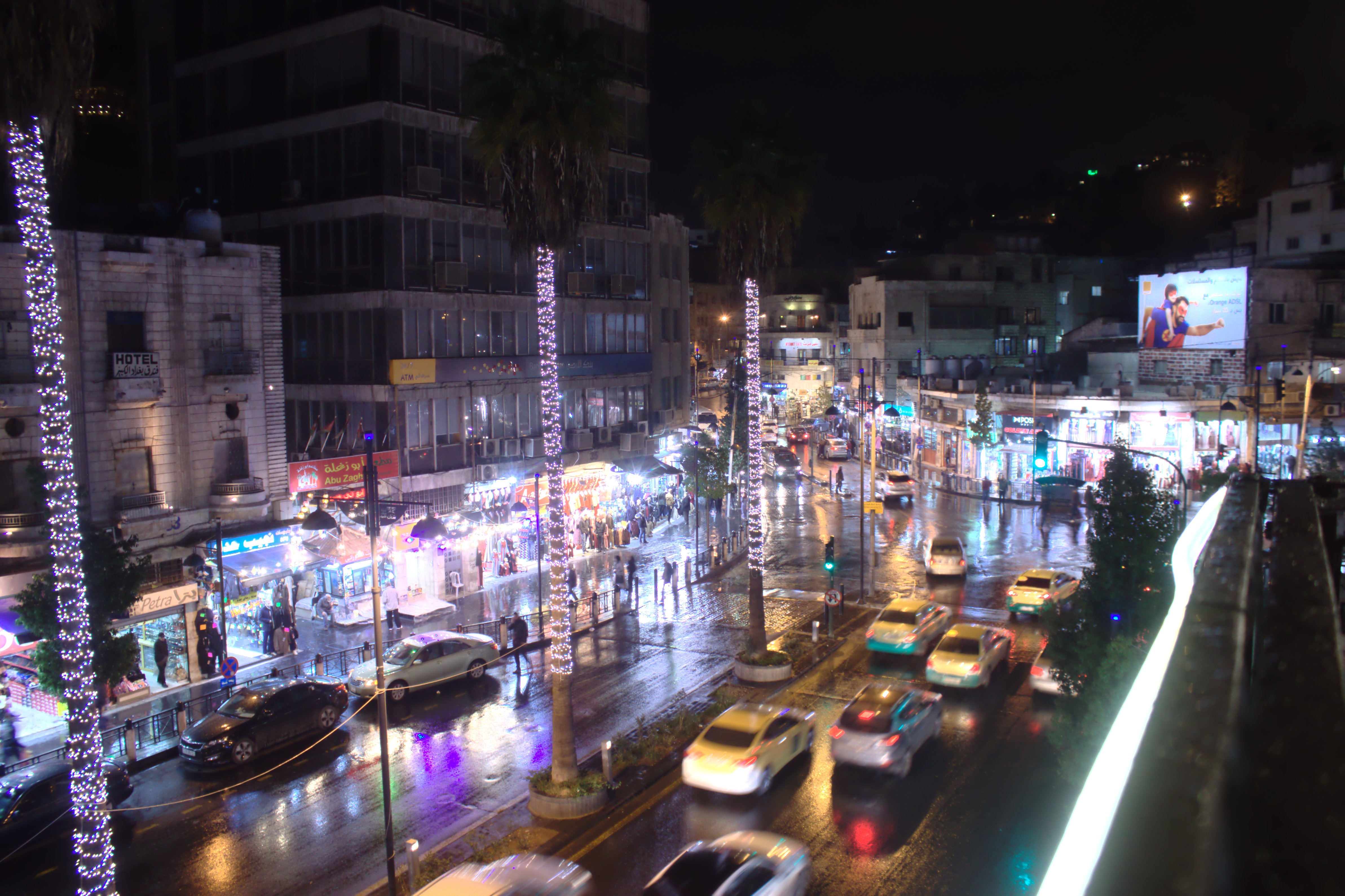 Ulice krále Faisala v metropoli Ammán, Jordánsko